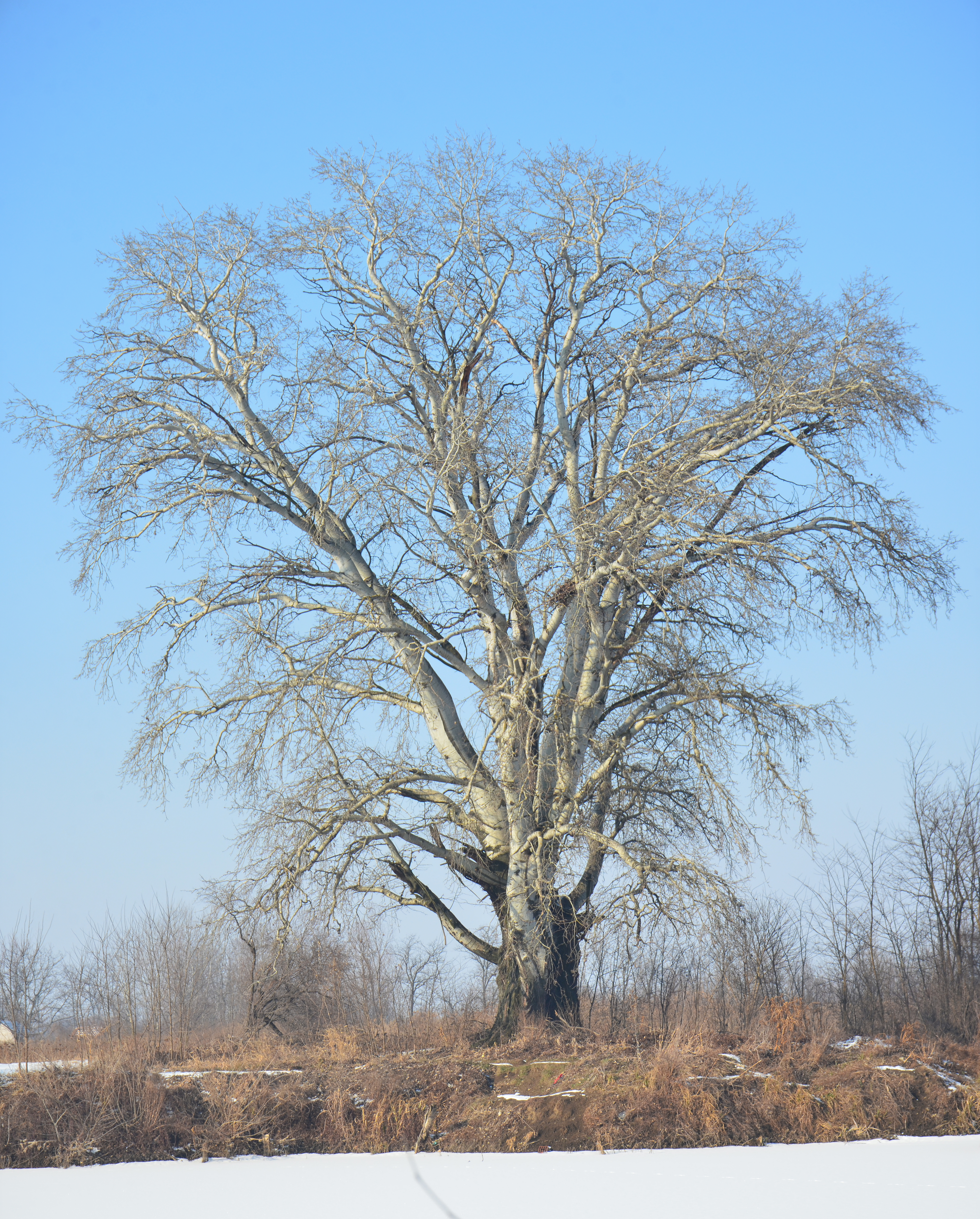 Српски (ћирилица): Зимска панорама Специјалног резервата природе Брзанско Моравиште